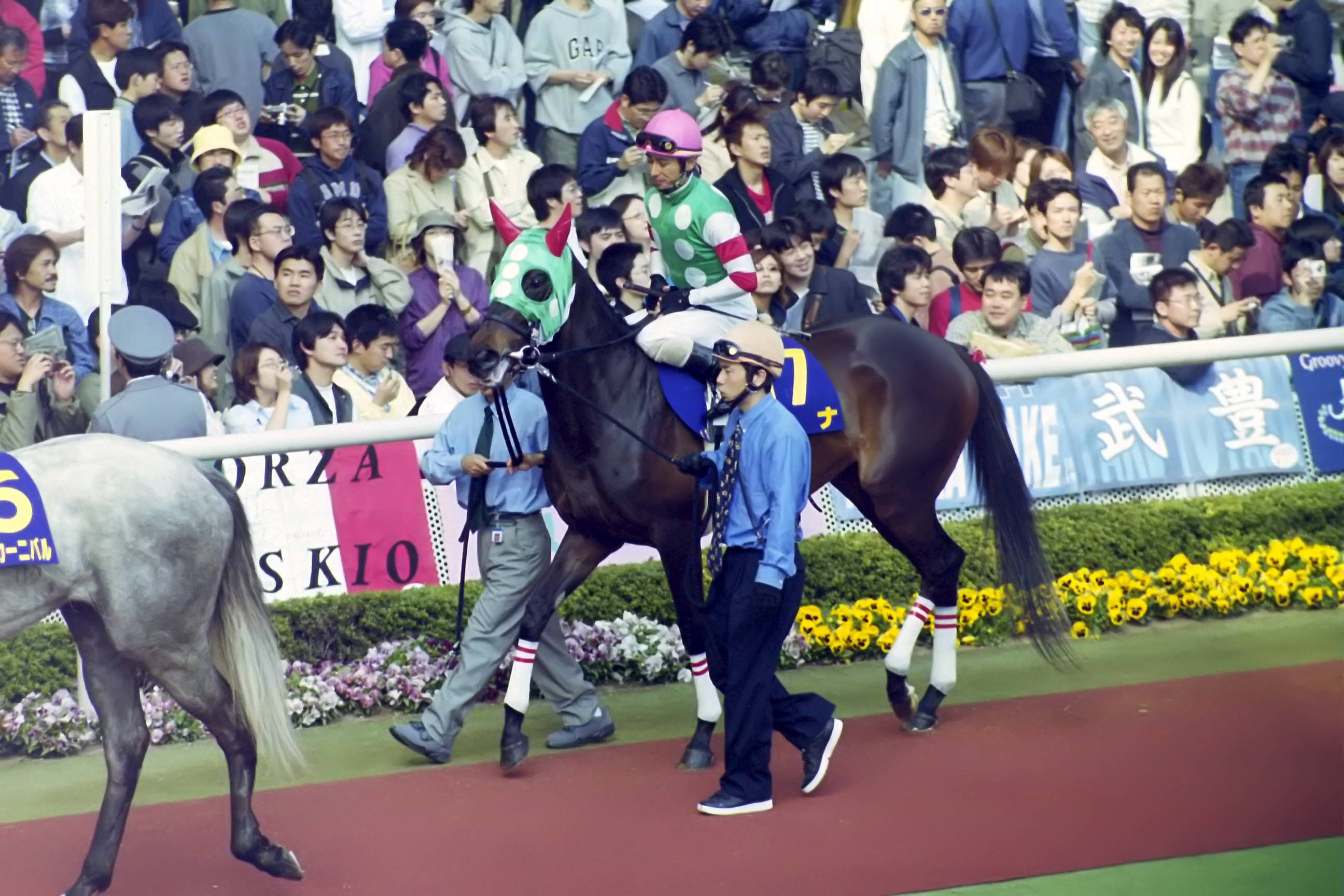 競走馬 ワナ号